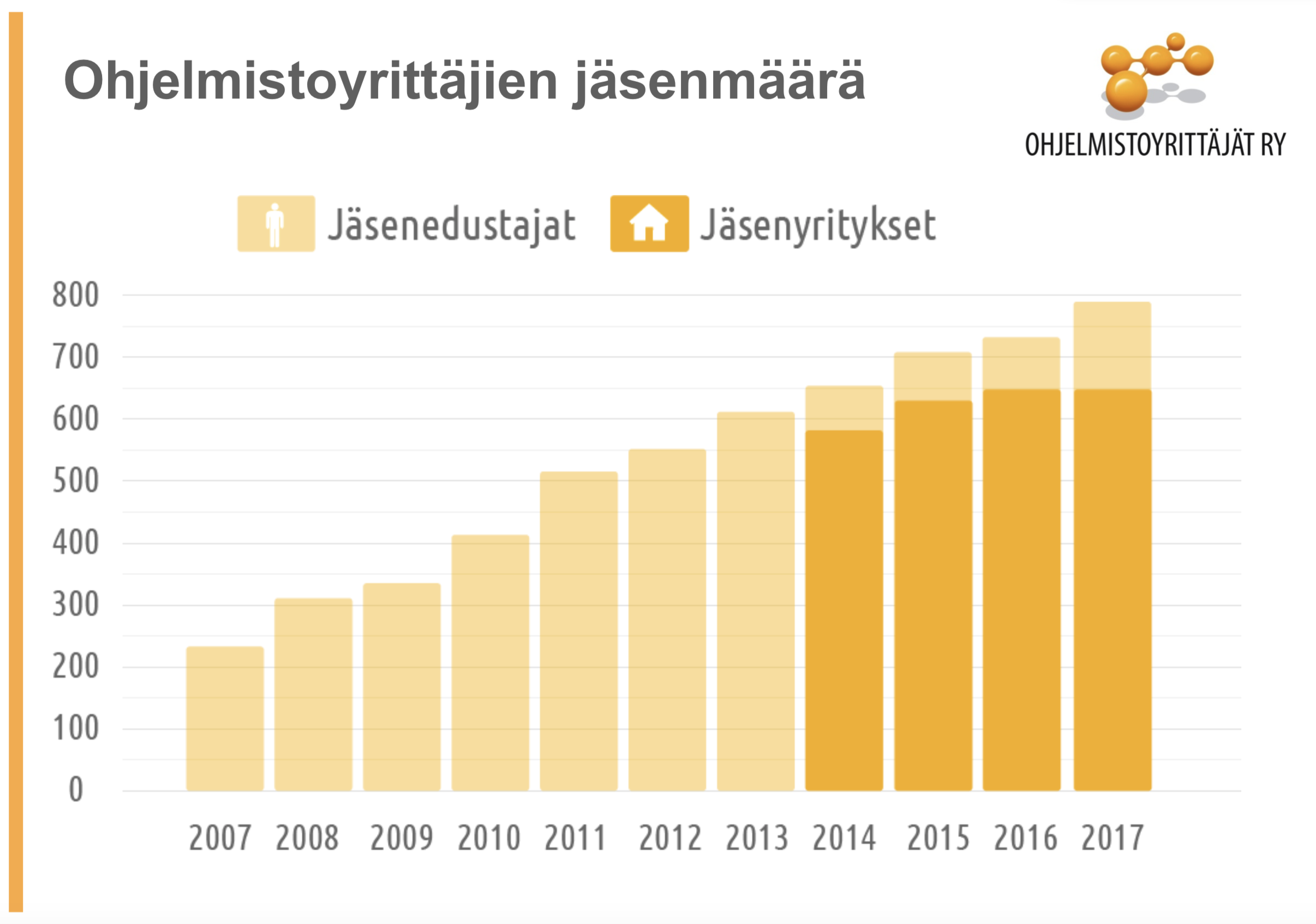 Ohjelmistoyrittäjien jäsenmäärän kehitys 2007-2017.